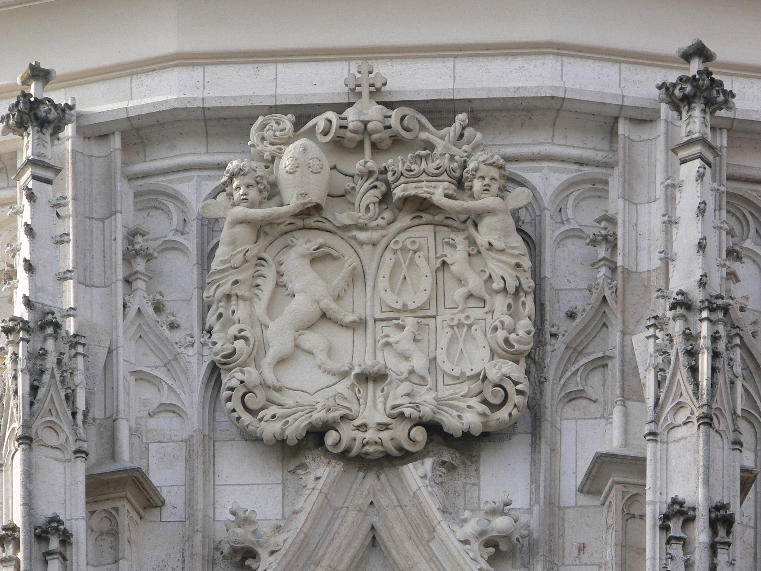 Passau, Dom, Wappen des BIschofs Sebastian von Pötting an der Außenseite des Chors (fotografiert vom Residenzplatz aus)